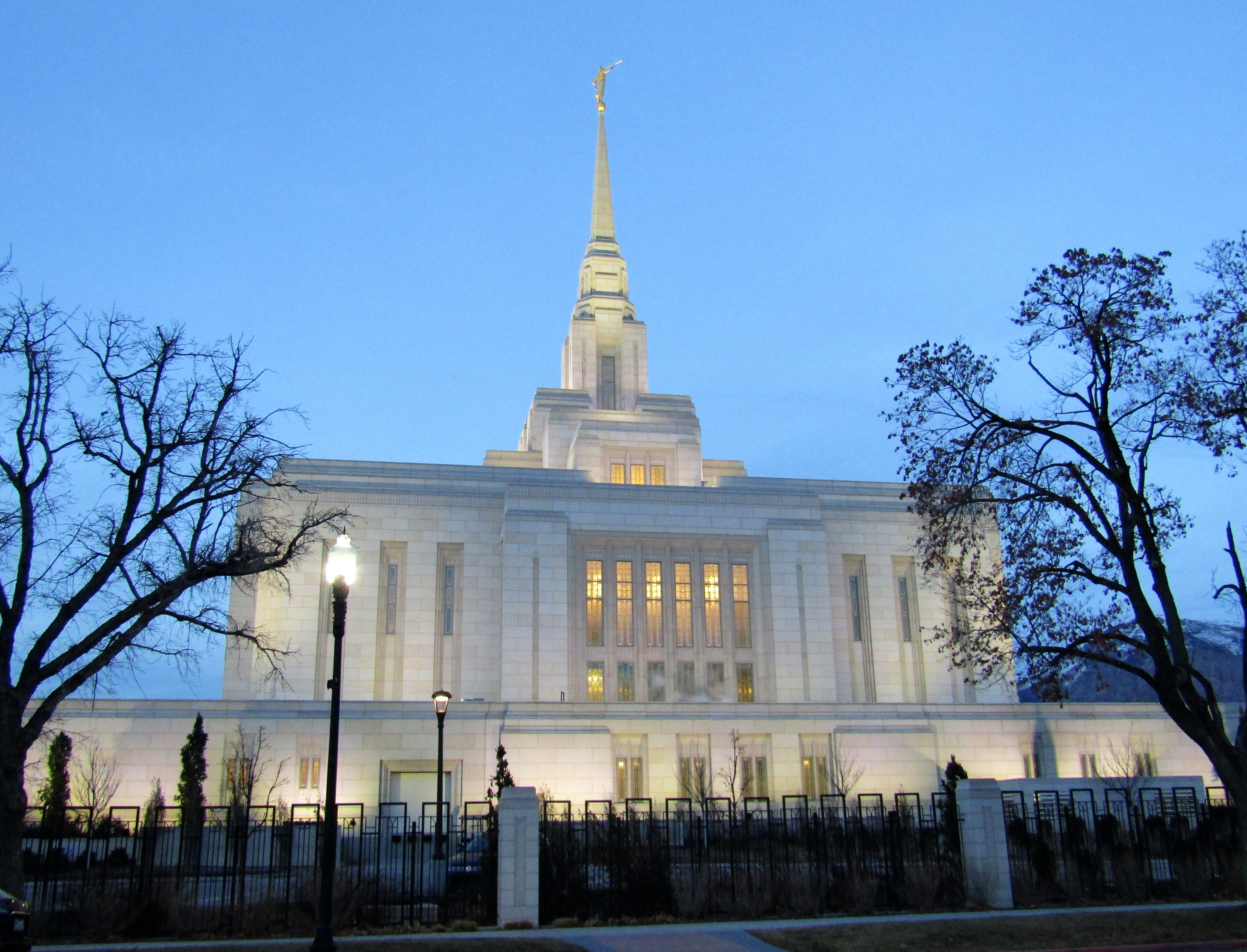 LDS temple in Ogden, Utah.